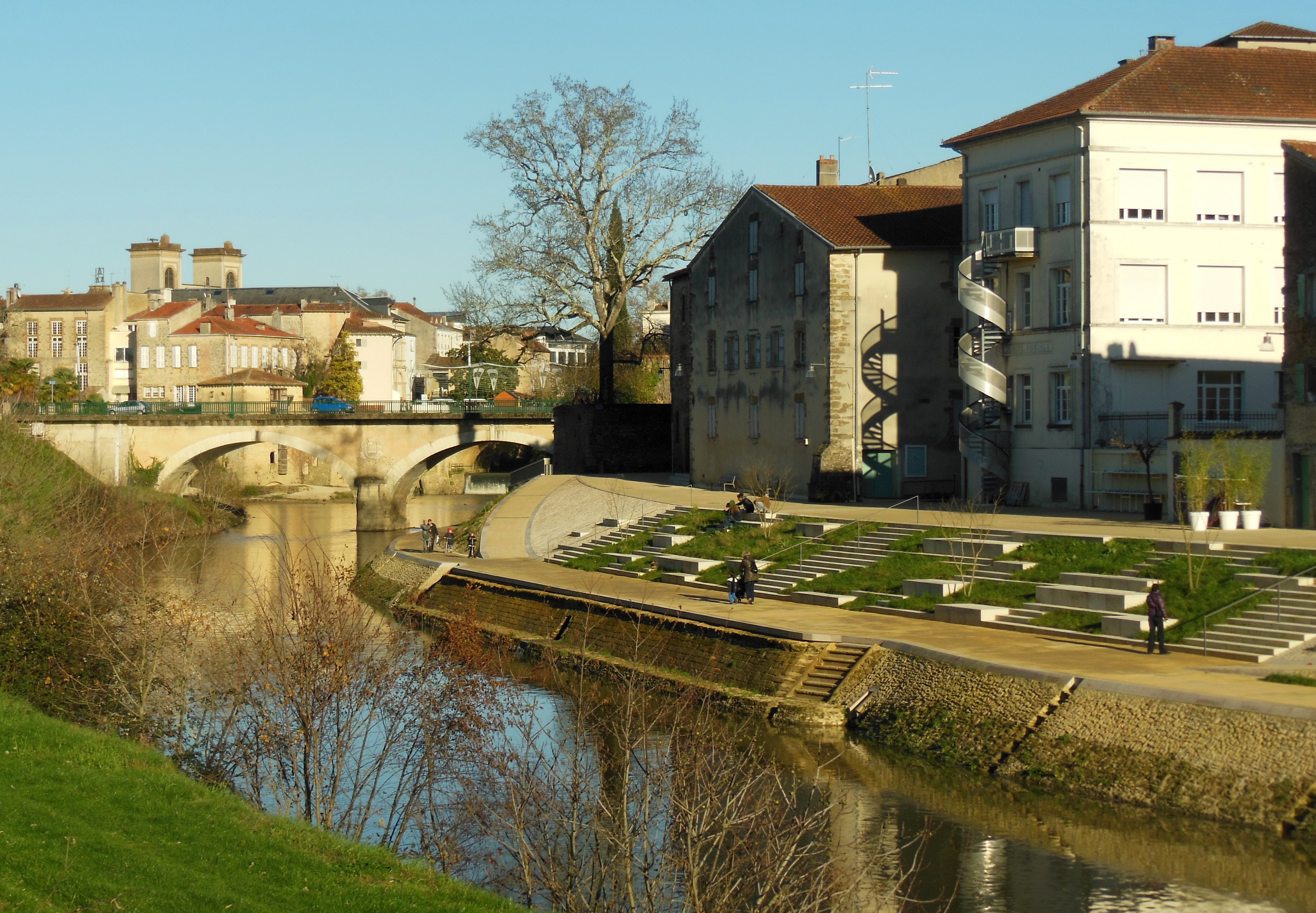 Berges aménagées de la Midouze à Mont-de-Marsan. On aperçoit en arrière-plan le clocher de l'église de la Madeleine